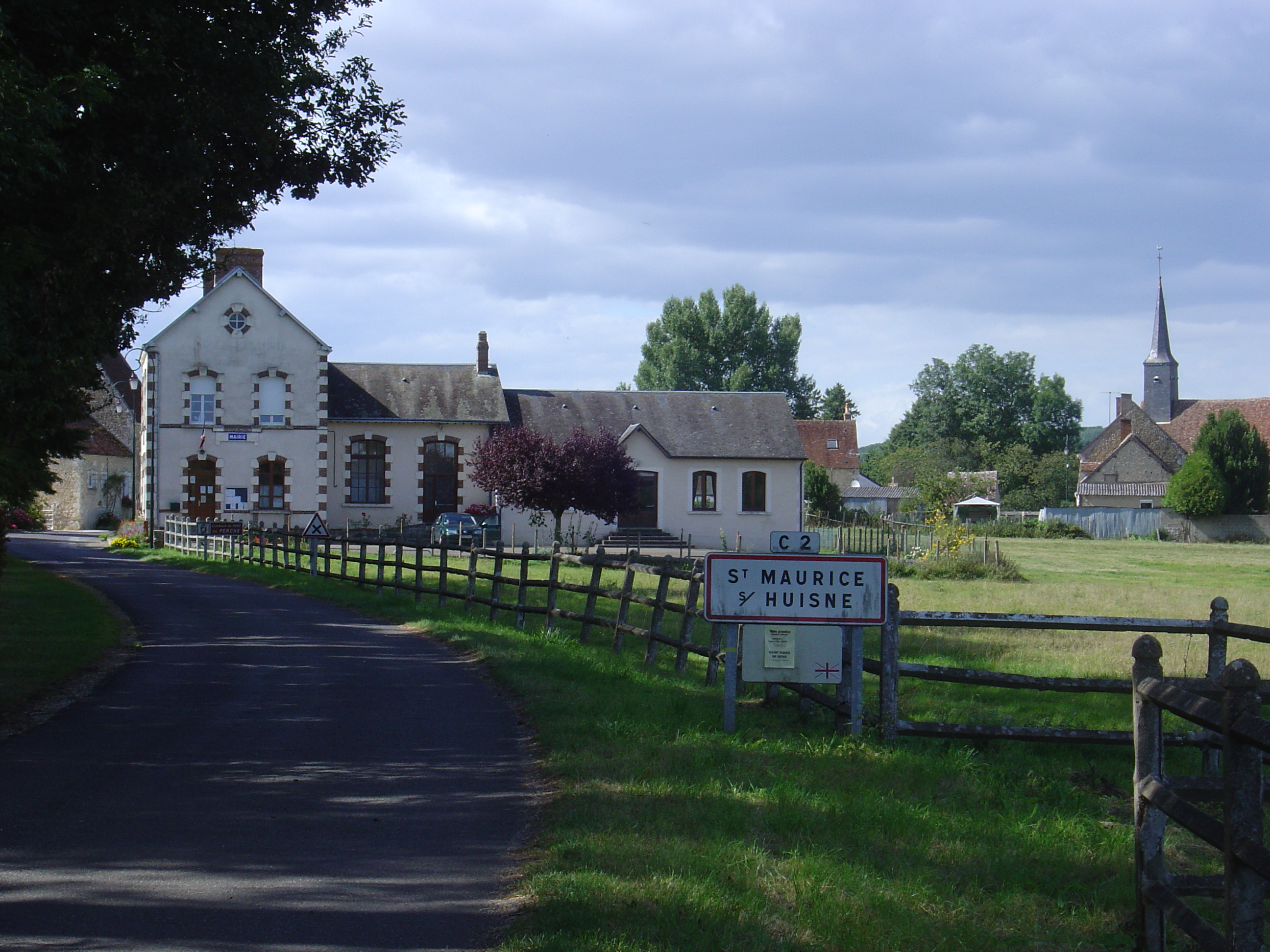 Vue depuis l'entrée du village.